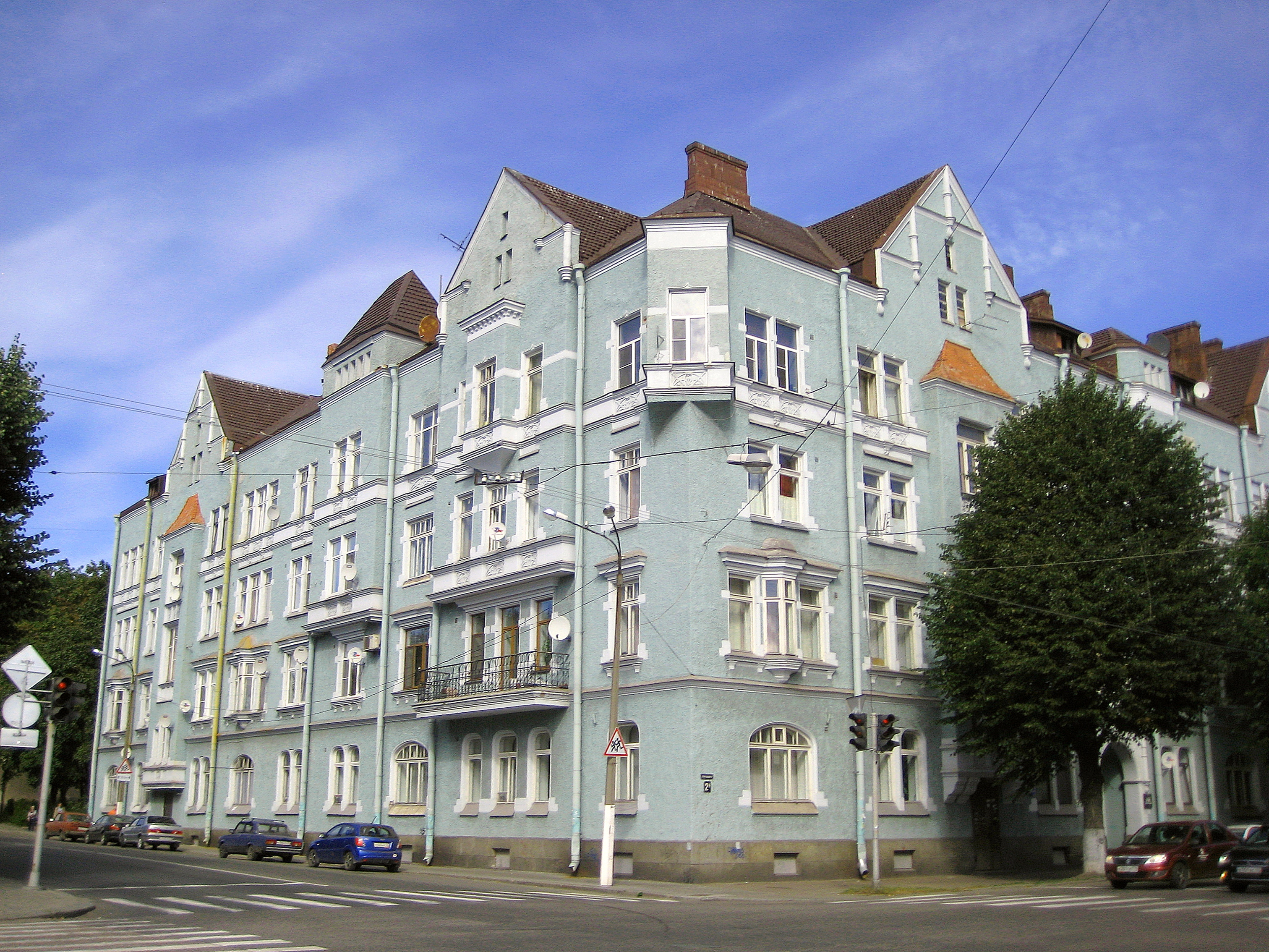 Выборг. Дом АО Пеликан. 1907 г. арх. Герхард Сольберг. Ленинградский пр. 2.